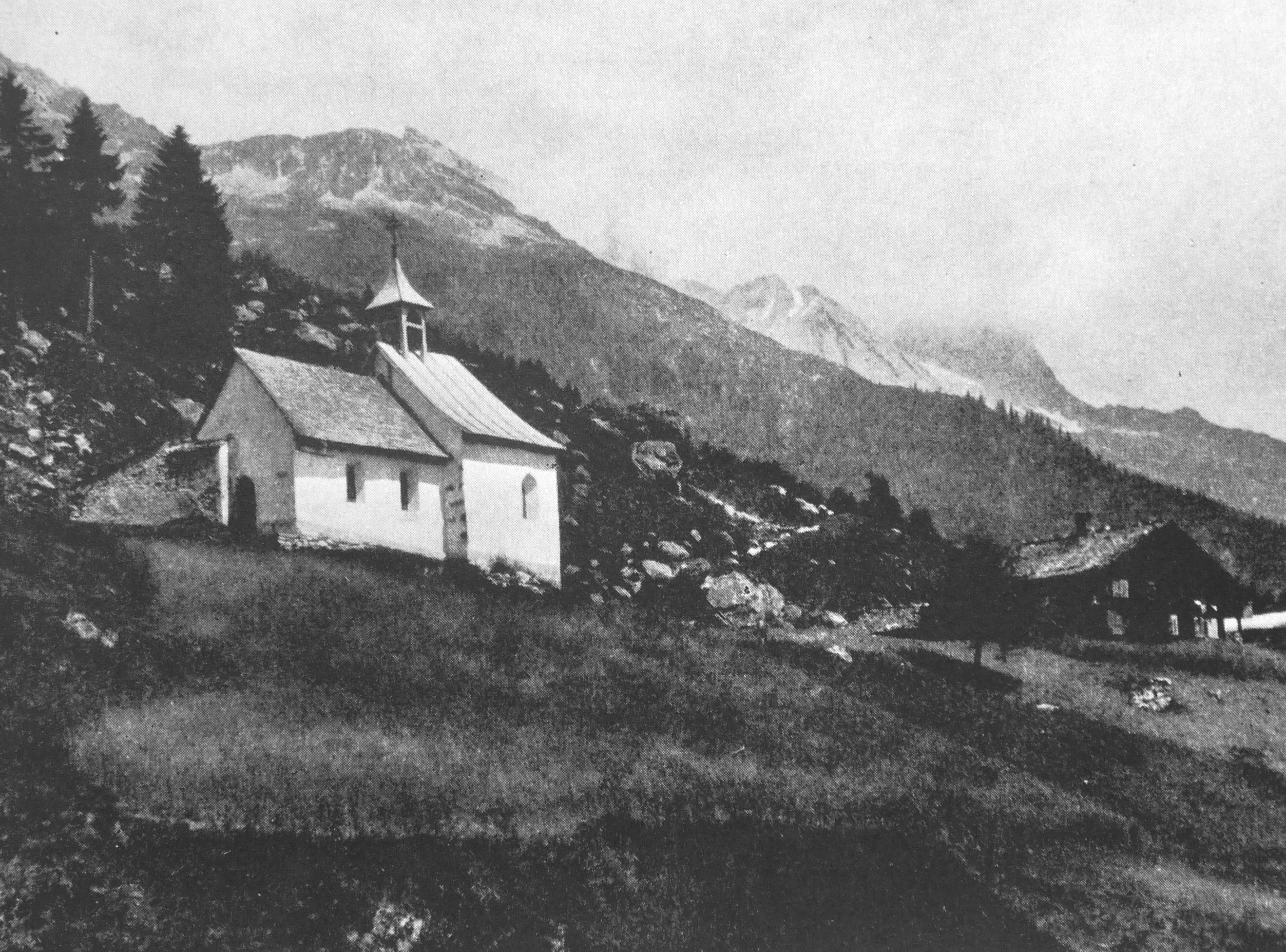 Kirche Sogn Benedetg oberhalb Sumvitg um 1920